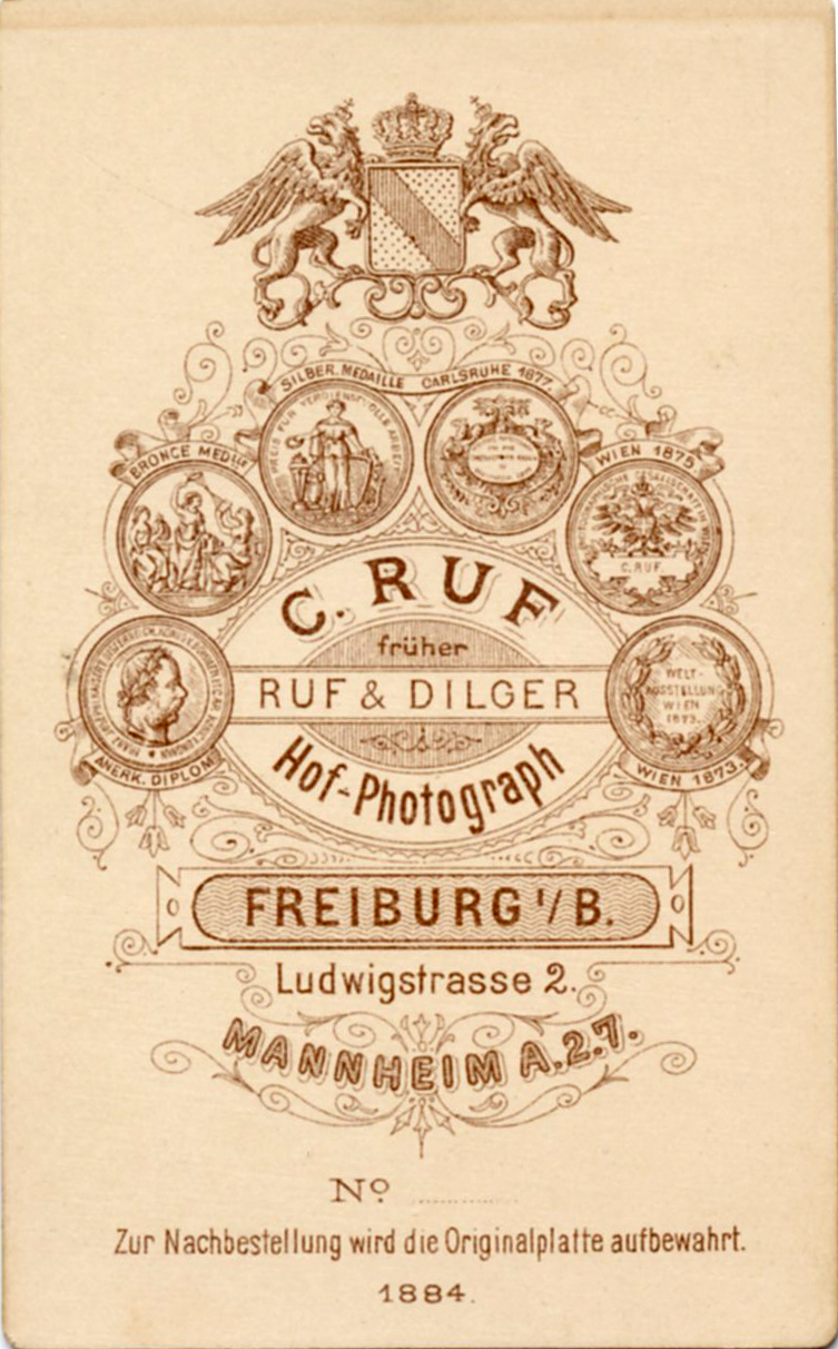 Rückseite einer Carte Cabinet des Fotografischen Ateleris C. Ruf